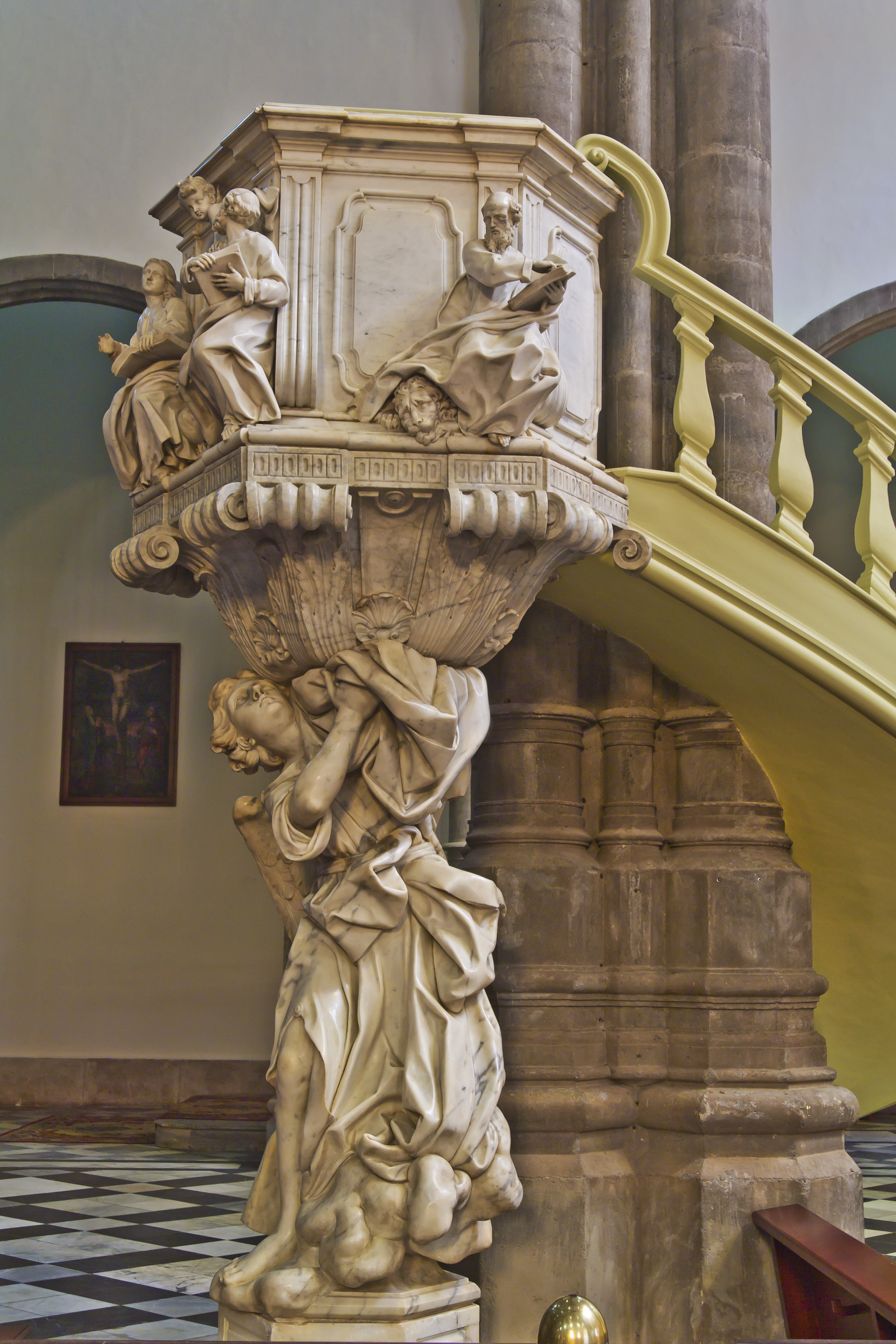 Kanzel des Künstlers Pasquale Bocciardo in der Kathedrale in La Laguna